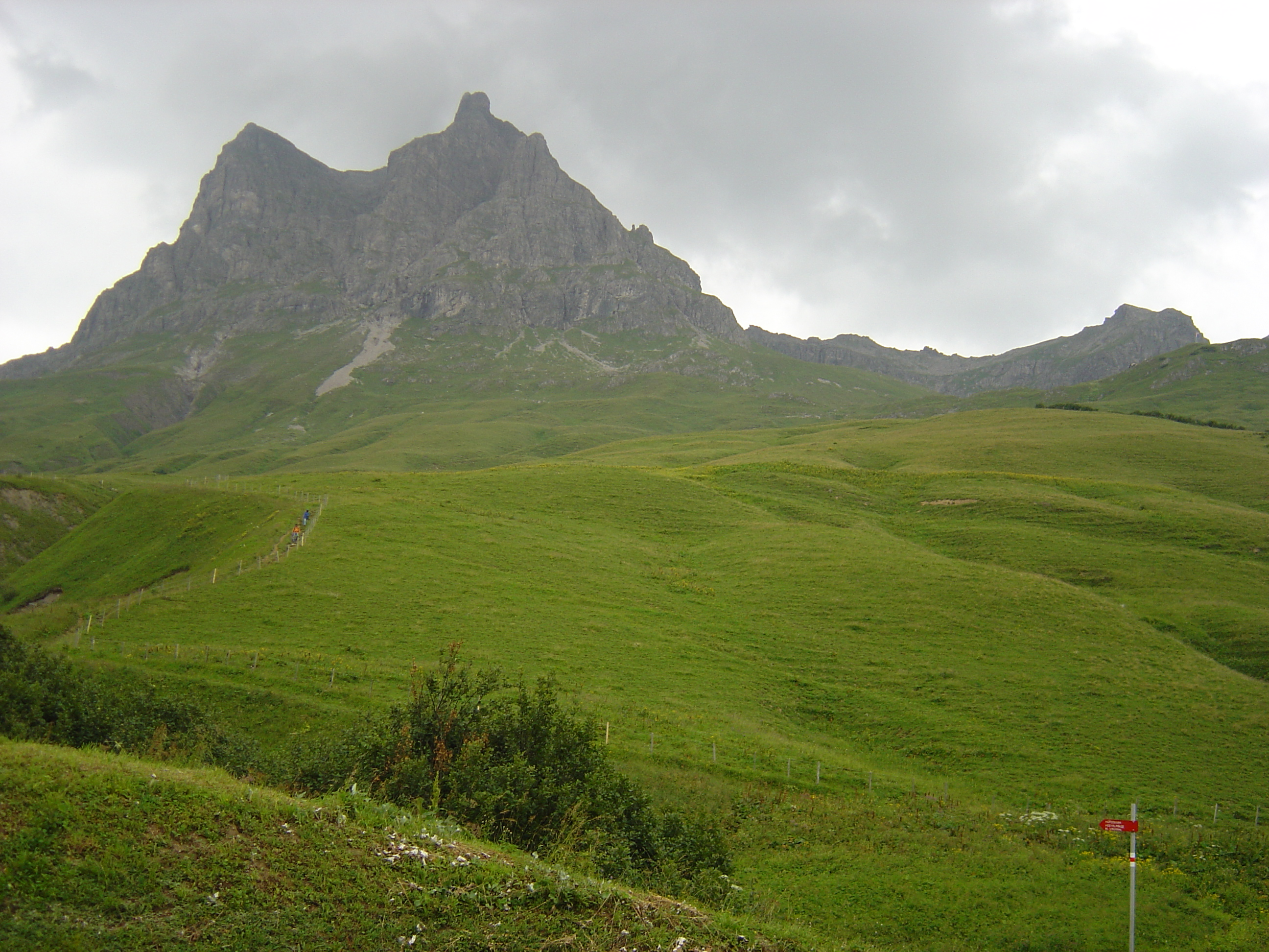 Großer Widderstein vom Hochtannbergpass